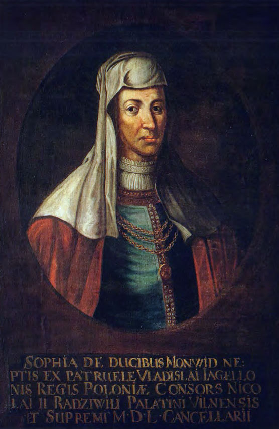 Беларуская (тарашкевіца): Партрэт Соф'і Радзівіл (Sofja Radzivił) з роду Манівідаў (Manivid)